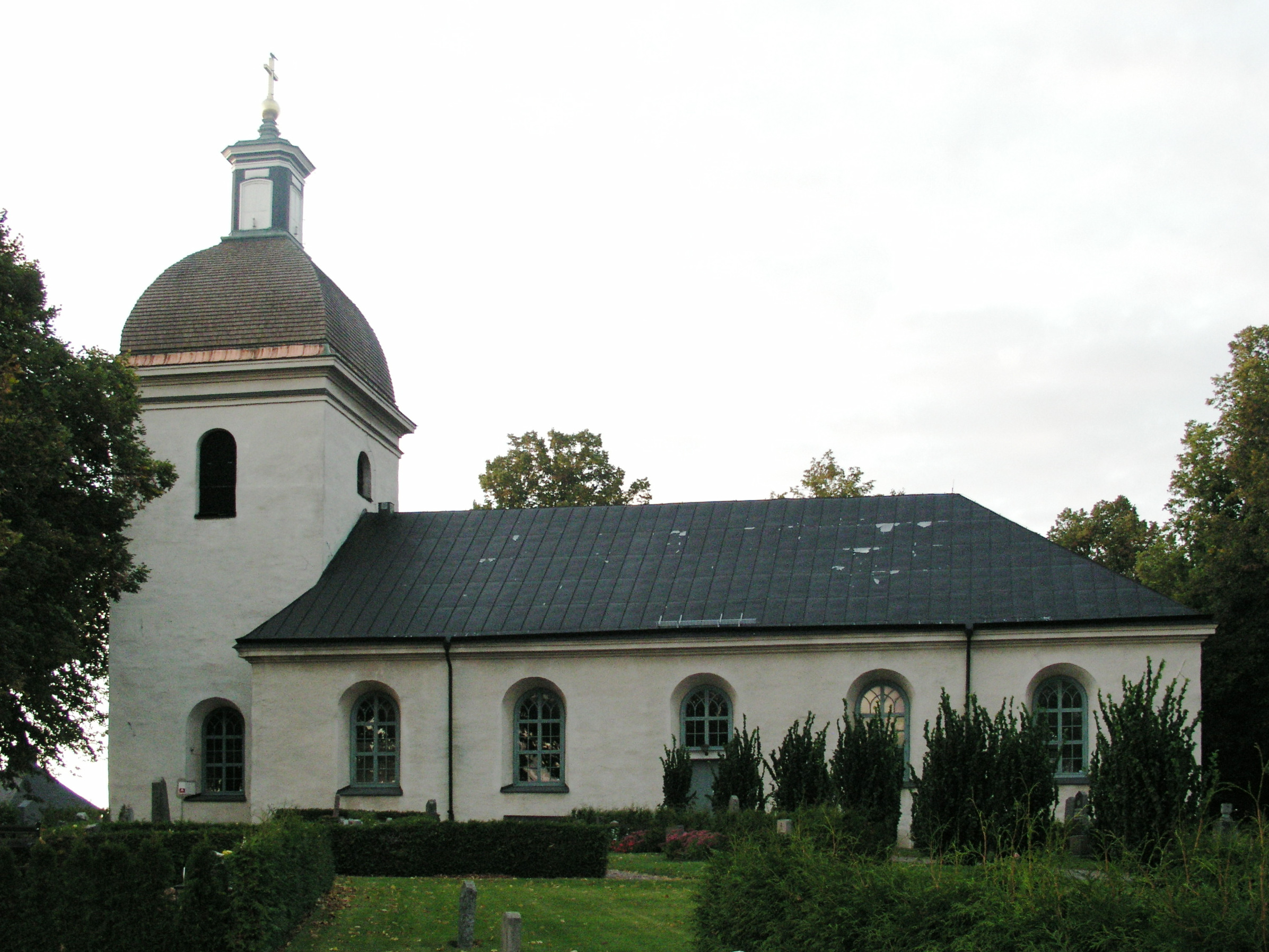 Styrstads kyrka /Styrstad church. Diocese of Linköping. Norrköping.